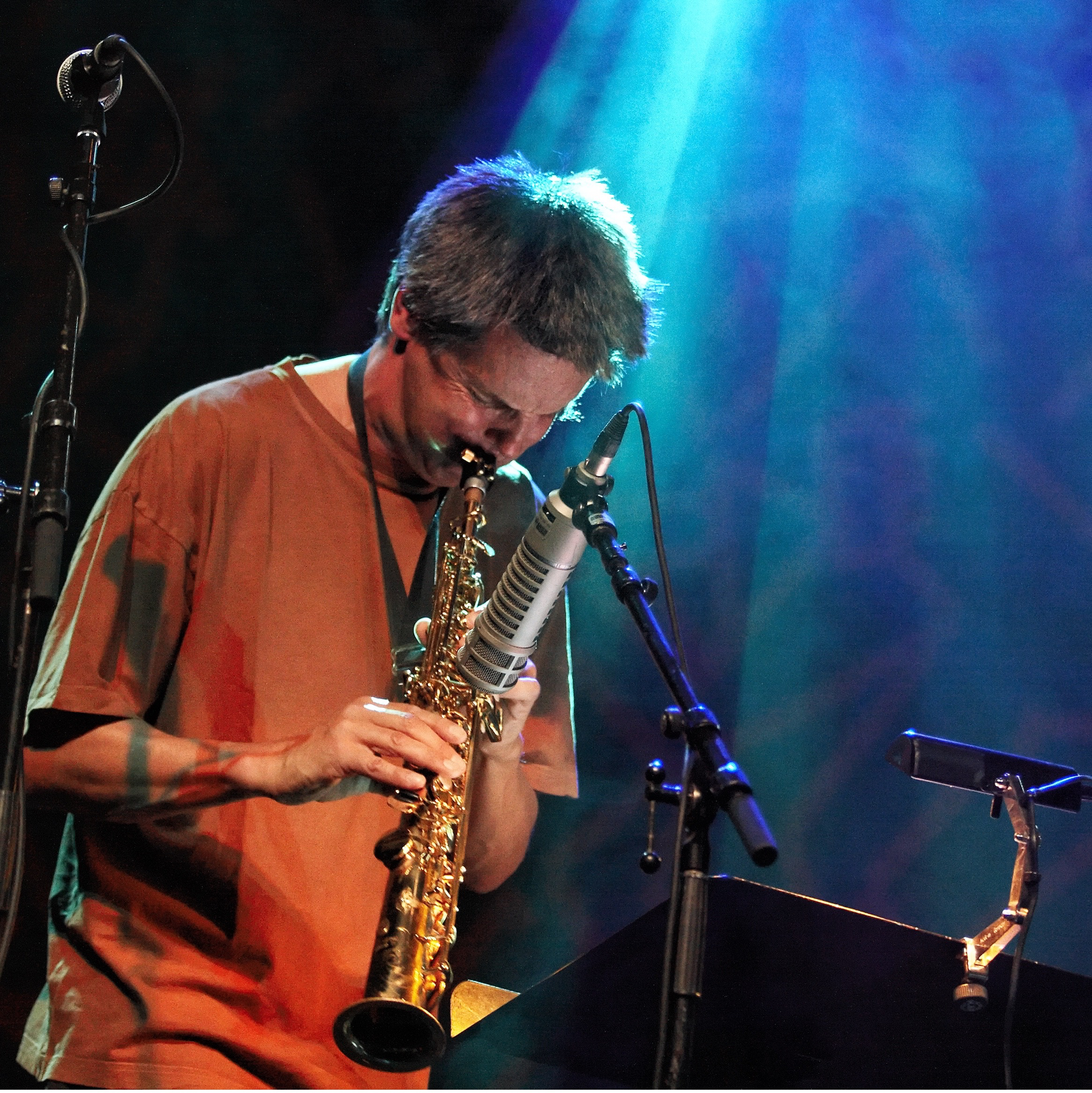 Albin Brun am Jazzfestival Willisau 2008